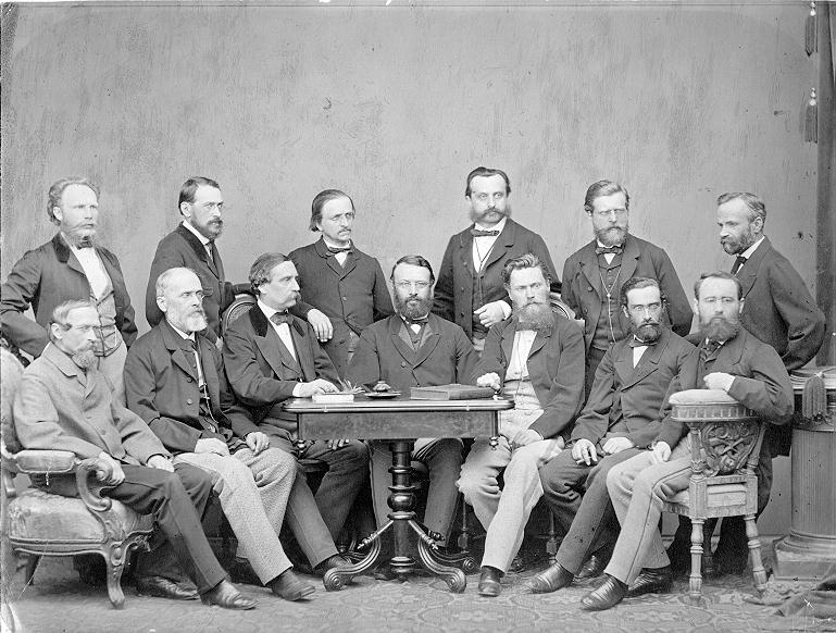 Brno, profesorský sbor německé vysoké školy technické, rok 1867. Sedící zleva: Bernard Quadrat (chemie), Jan Helcelet (zemědělství), Georg Beskiba (pozemní stavitelství), Richard von Bleyleben (řemeslné, obchodní a směnečné právo a národní hospodářství), Leopold Hauffe (stavba strojů), Niessl von Mayendorf (praktická geometrie a meliorace) a Robert Felgel (fyzika). Stojící zleva: Adolf Peschka (deskriptivní geoemetrie), Friedrich Arzberger (mechanická technologie), Friedrich Marian (chemická technologie), Alexandr Makovsky (mineralogie a geologie), Edmund Autenrieth (mostní stavitelství), Karl Prentner (matematika).